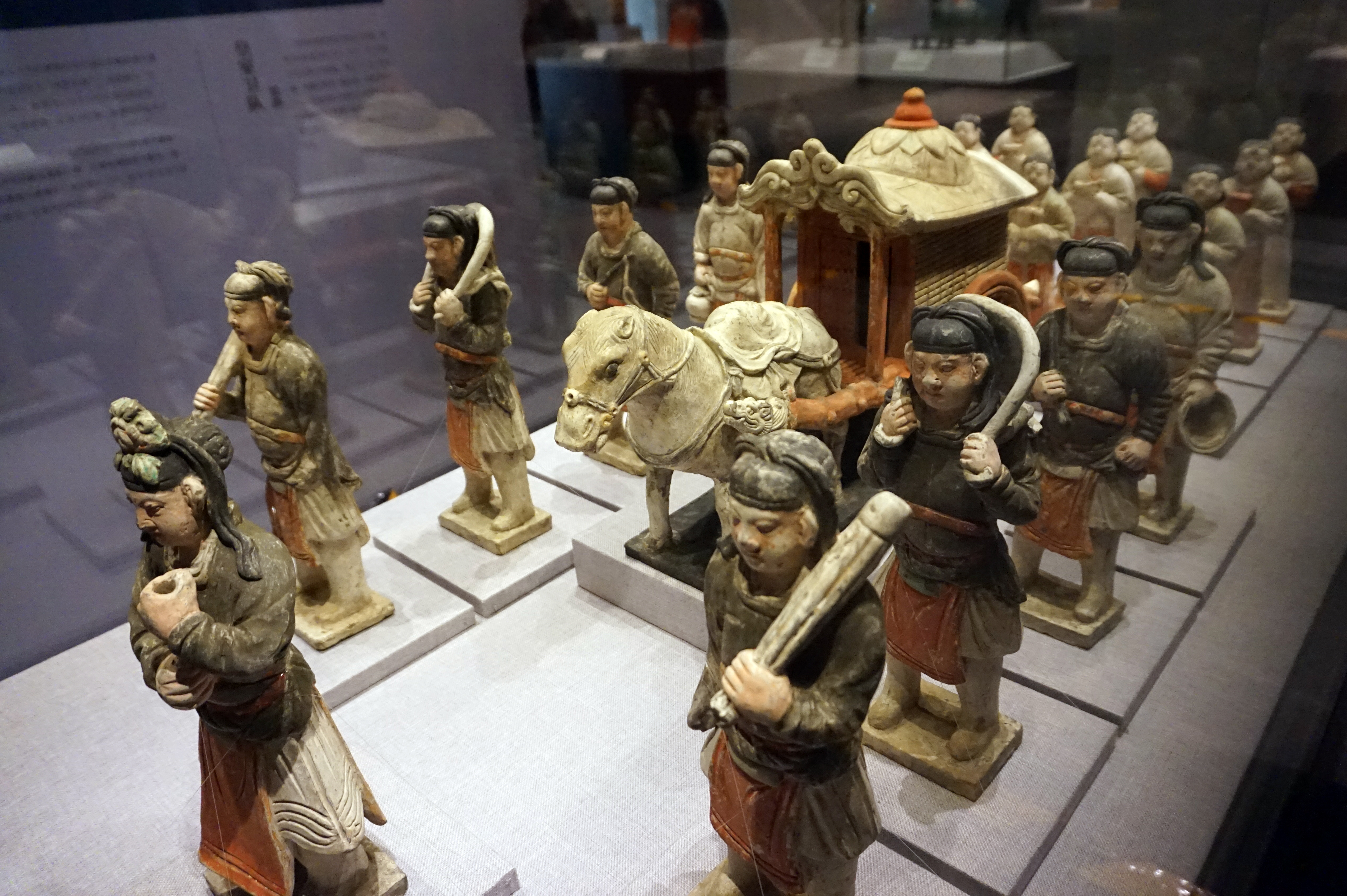 中国出土的第一套完整的元代出行仪仗陶俑方阵。模印与捏塑结合，通体施彩，部分涂金。河南省焦作市中站区许衡街道办东王封村出土，焦作市博物馆藏。